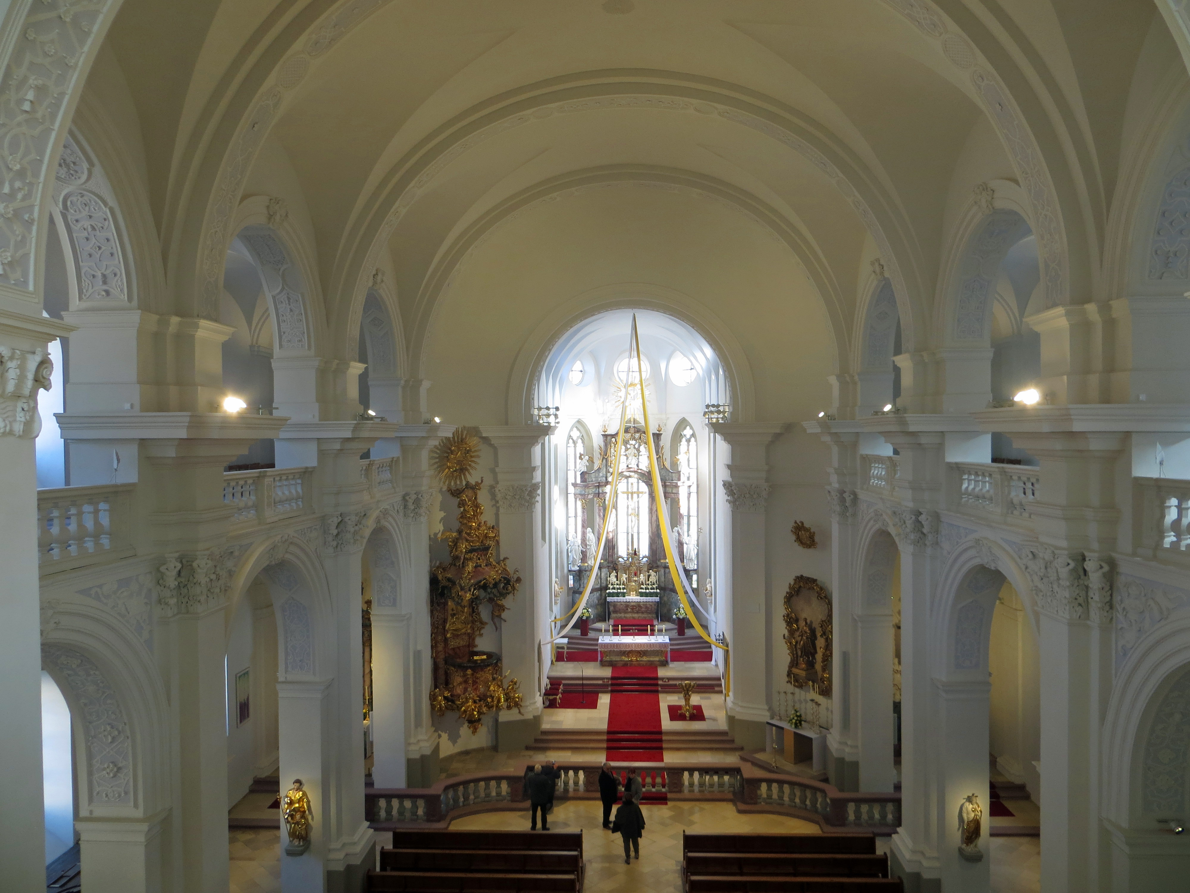 Blick von der Empore auf das Hauptschiff und den Chor der katholischen Pfarrkirche St. Peter und Paul in Würzburg nach der Innenrenovierung 2015/2016